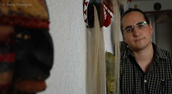 Foto de Jorge Luis Herrera tomada por Barry Domínguez